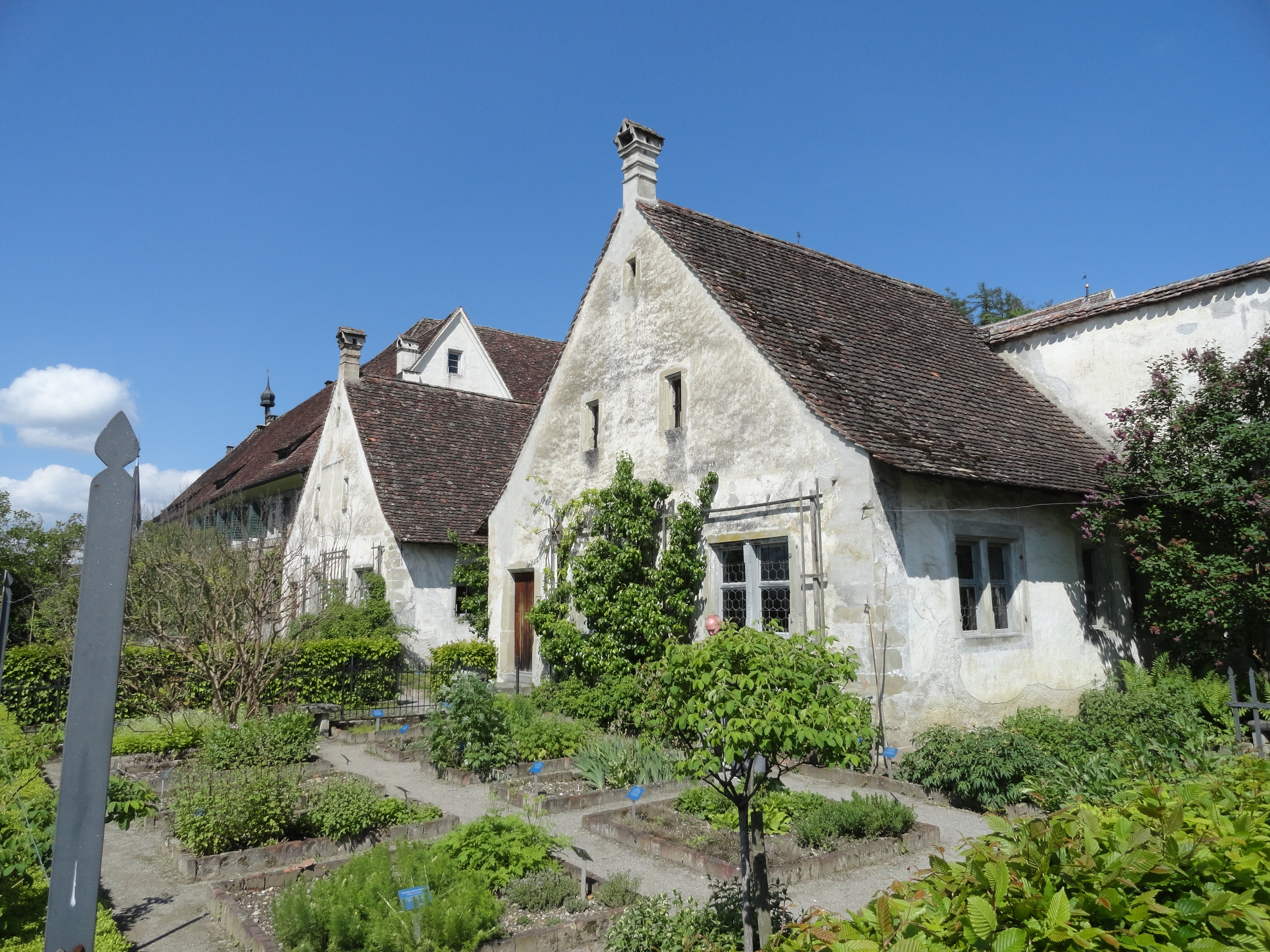 Kartause Ittingen: Zellenhäuschen der Mönche